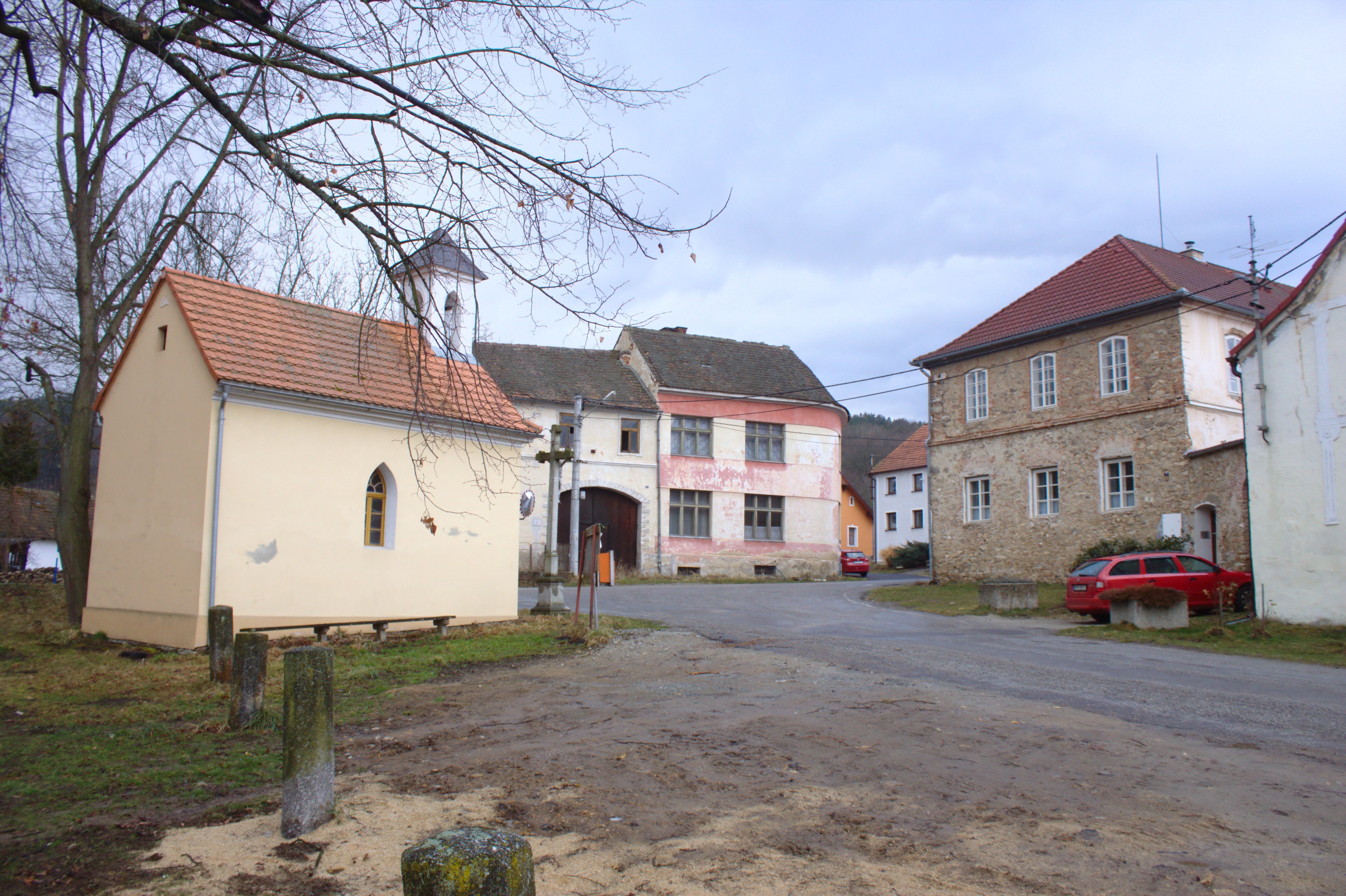 Náves ve vesnici Horní Chrášťany Project: Fotíme Česko